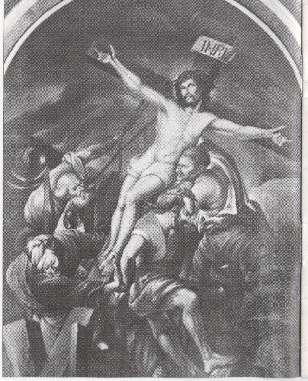 Kreuzerhöhung, Ölgemälde von Johann Adam Schlesinger, kath. Kirche Grünstadt